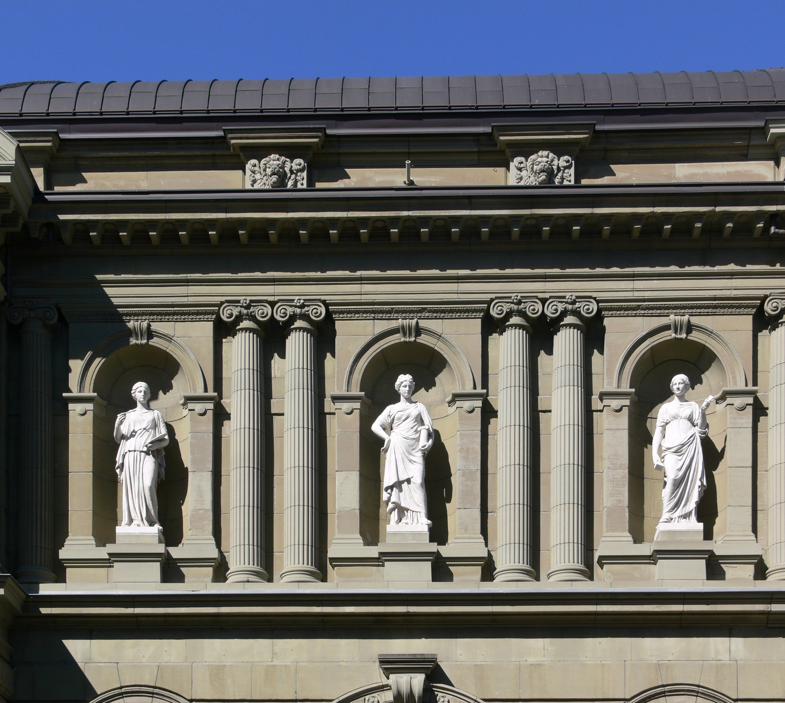 Fassadendetail: Allegorien der schönen Künste Malerei, Bildhauerei und Architektur von Karl Alfred Lanz